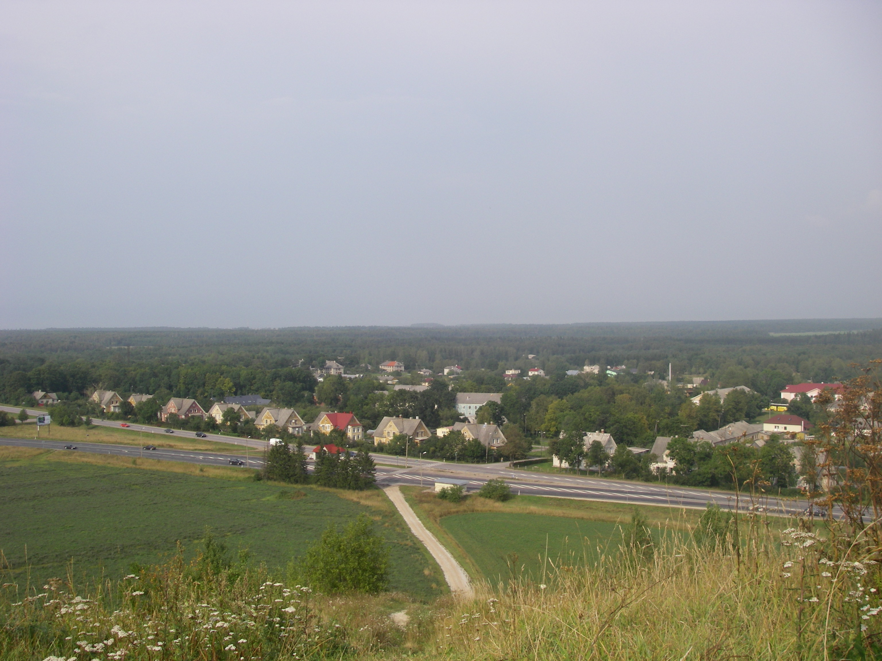 Vaade Kukruse linnaosale Kukruse mäe tipust 2007. augustis